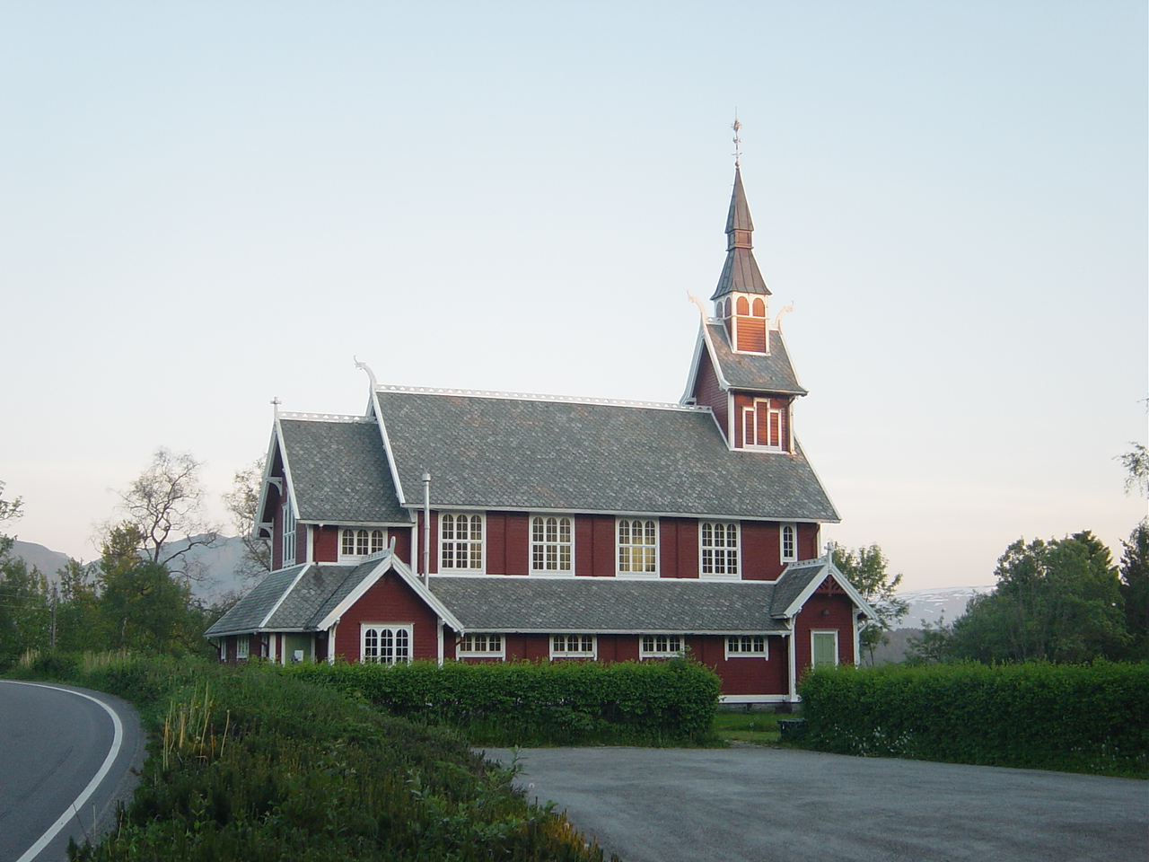 Molde and the Veøy kirke